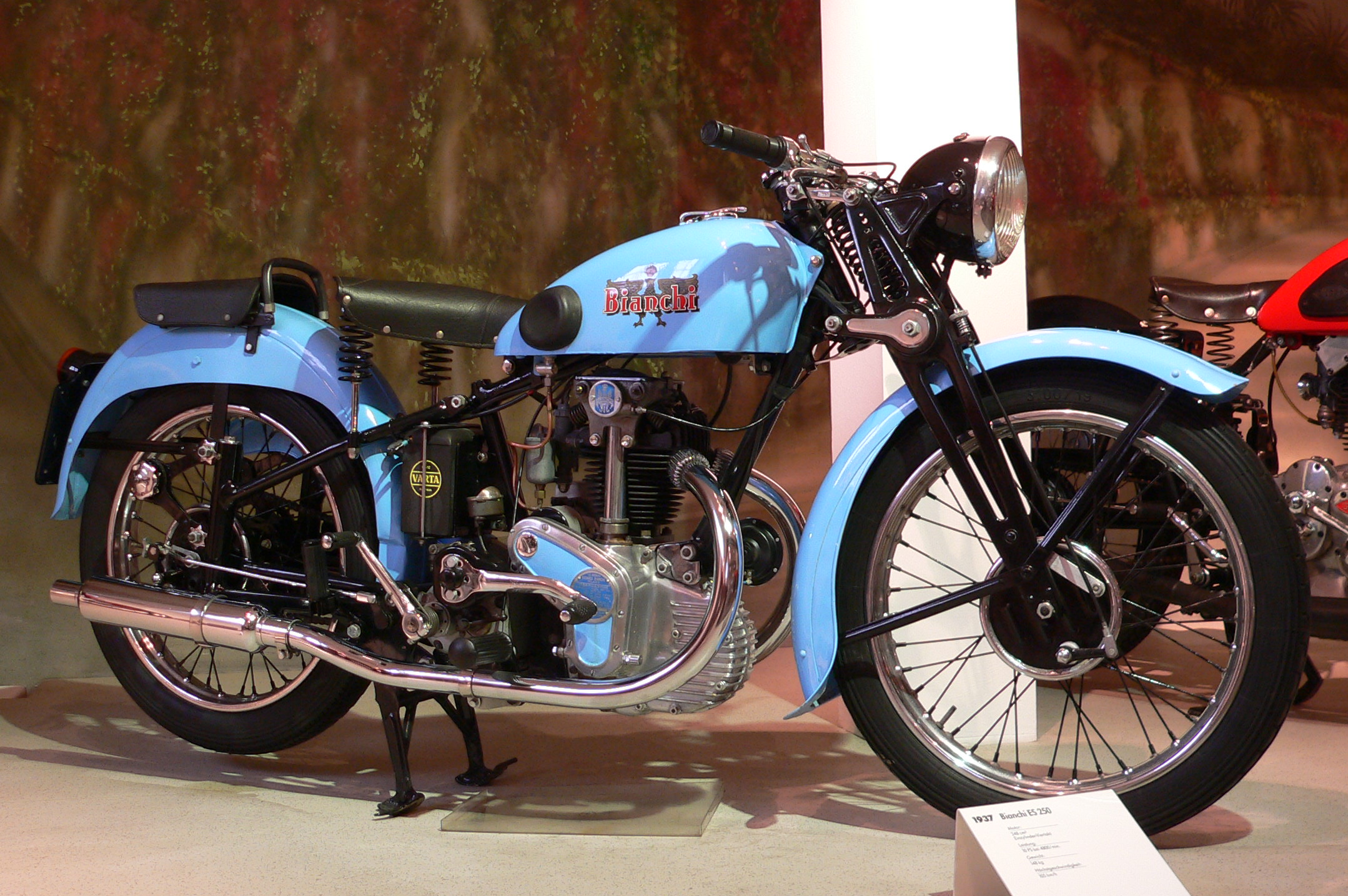 Motorbike "Bianchi ES 250" (1937) at the Deutsches Zweirad- und NSU-Museum (248 cm³, Einzylinder-Viertakt-Motor, 10 PS bei 4.800 U/min., 105 km/h)